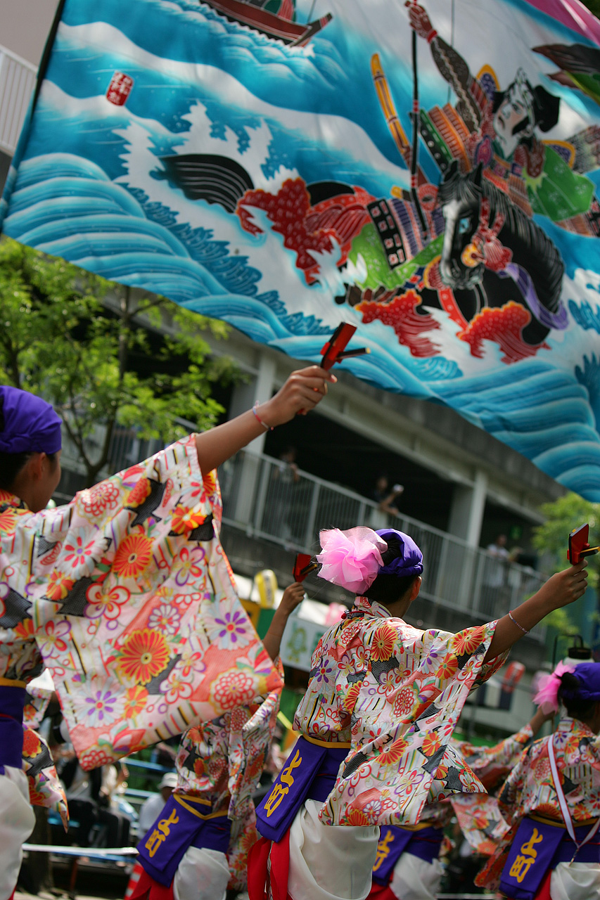 高知よさこい祭り2005